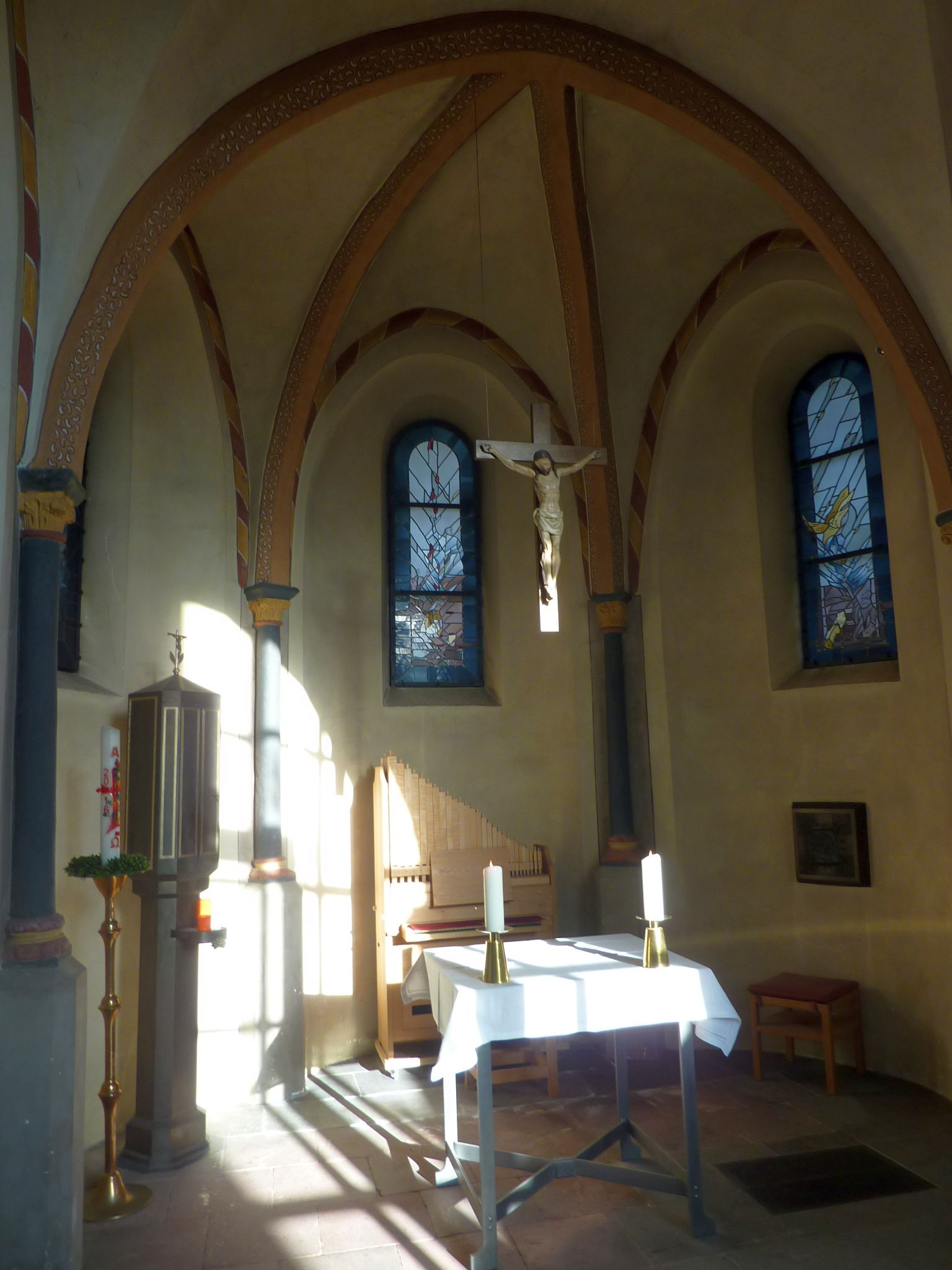 St. Katharina (Hackenbroich), alter Chorraum